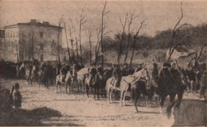 Почесний відді/і української кінноіи віддає останню пошану австрійським воякам , що полягли в бою з больш евиками. О деса, березен ь 1918 р.